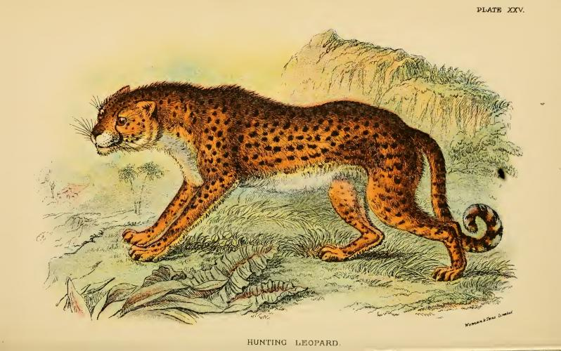 Hunting-Leopard / Cynalurus jubatus. Now Cheetah / Acinonyx jubatus